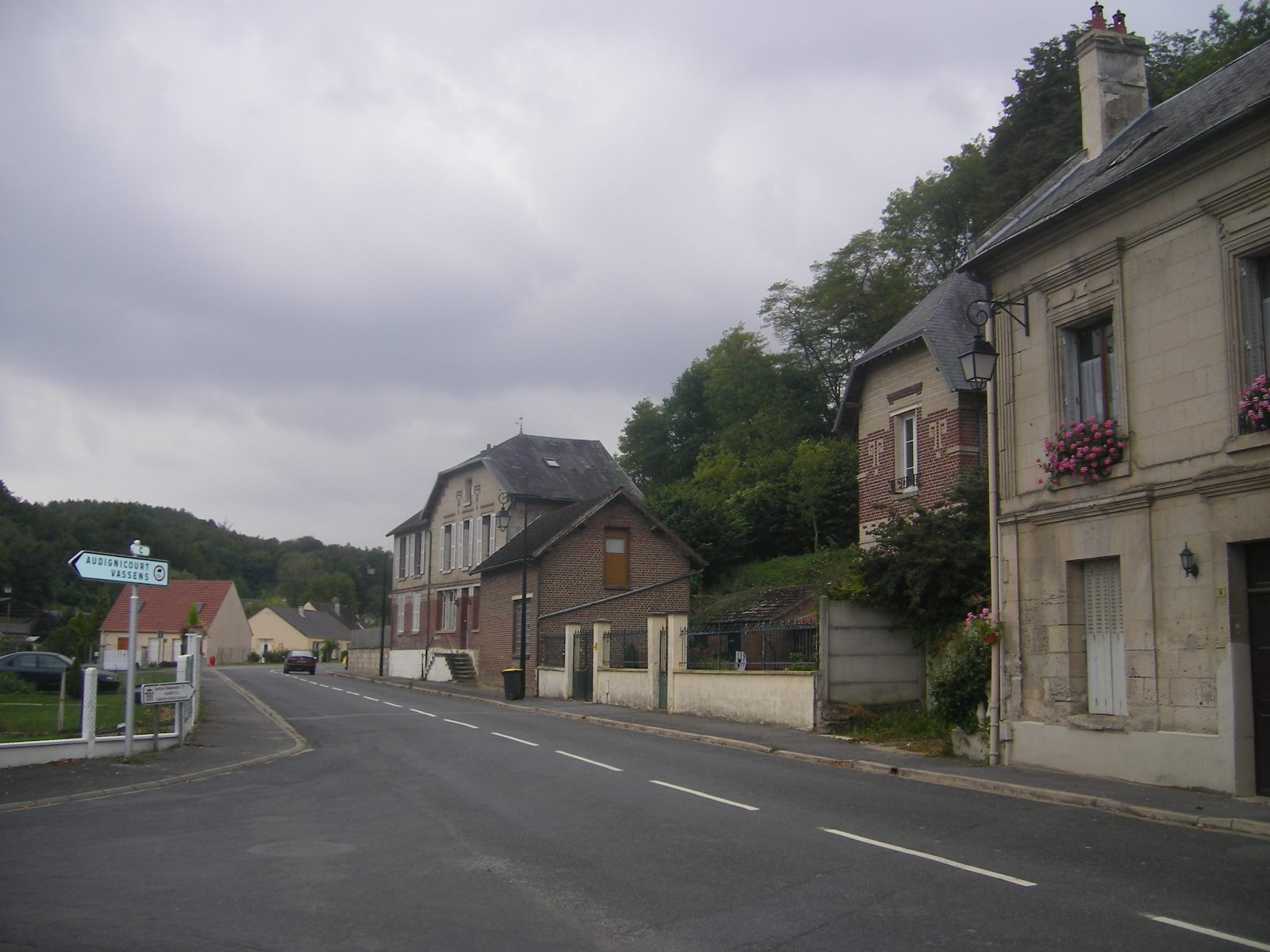 Nampcel